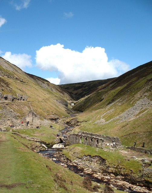 Blakethwaite smelt mill